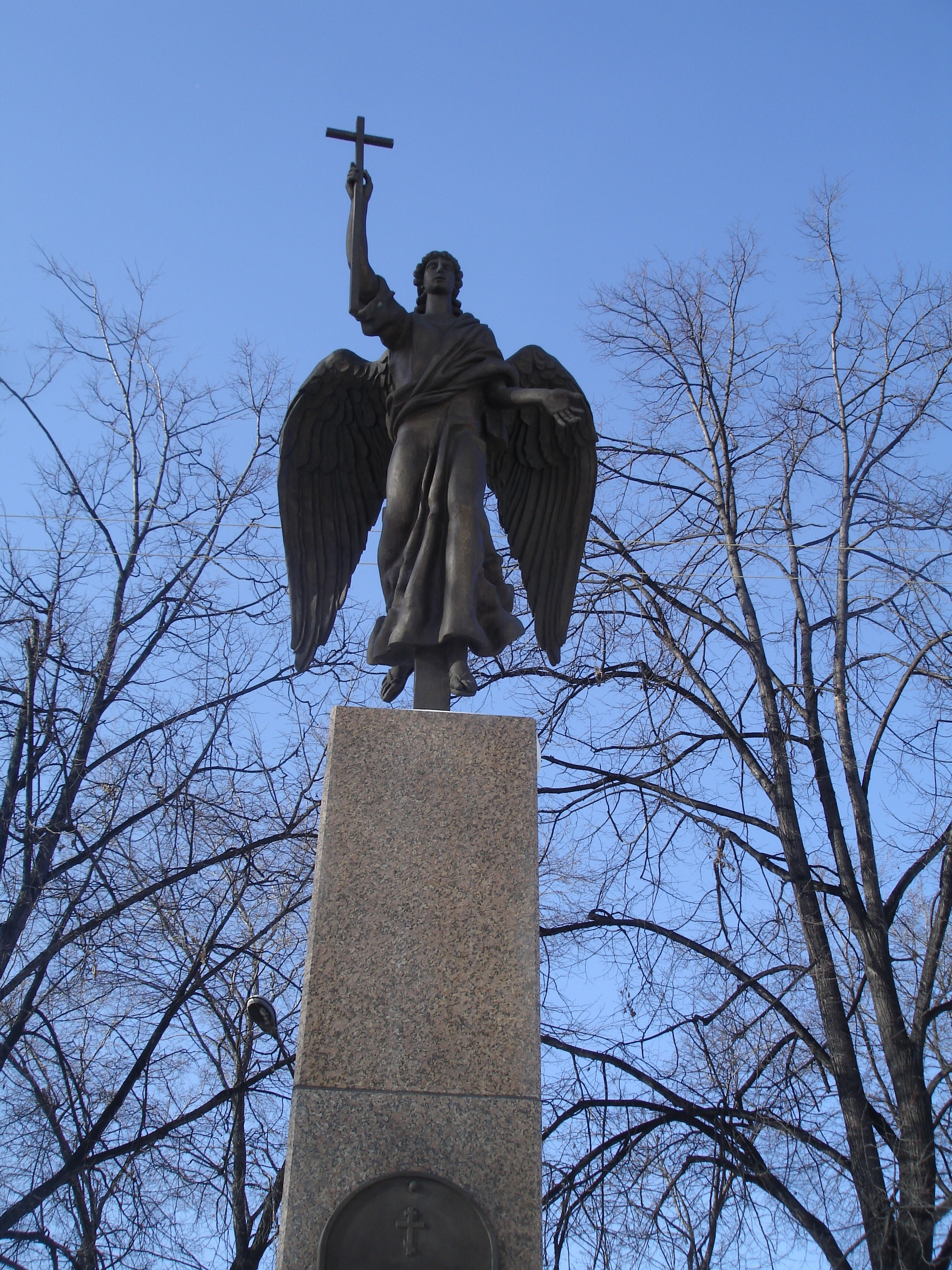 Храм Рождества Христова на Уралмаше.